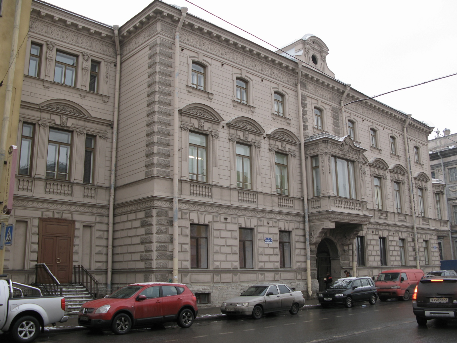 Миллионная ул., д.7, фасад